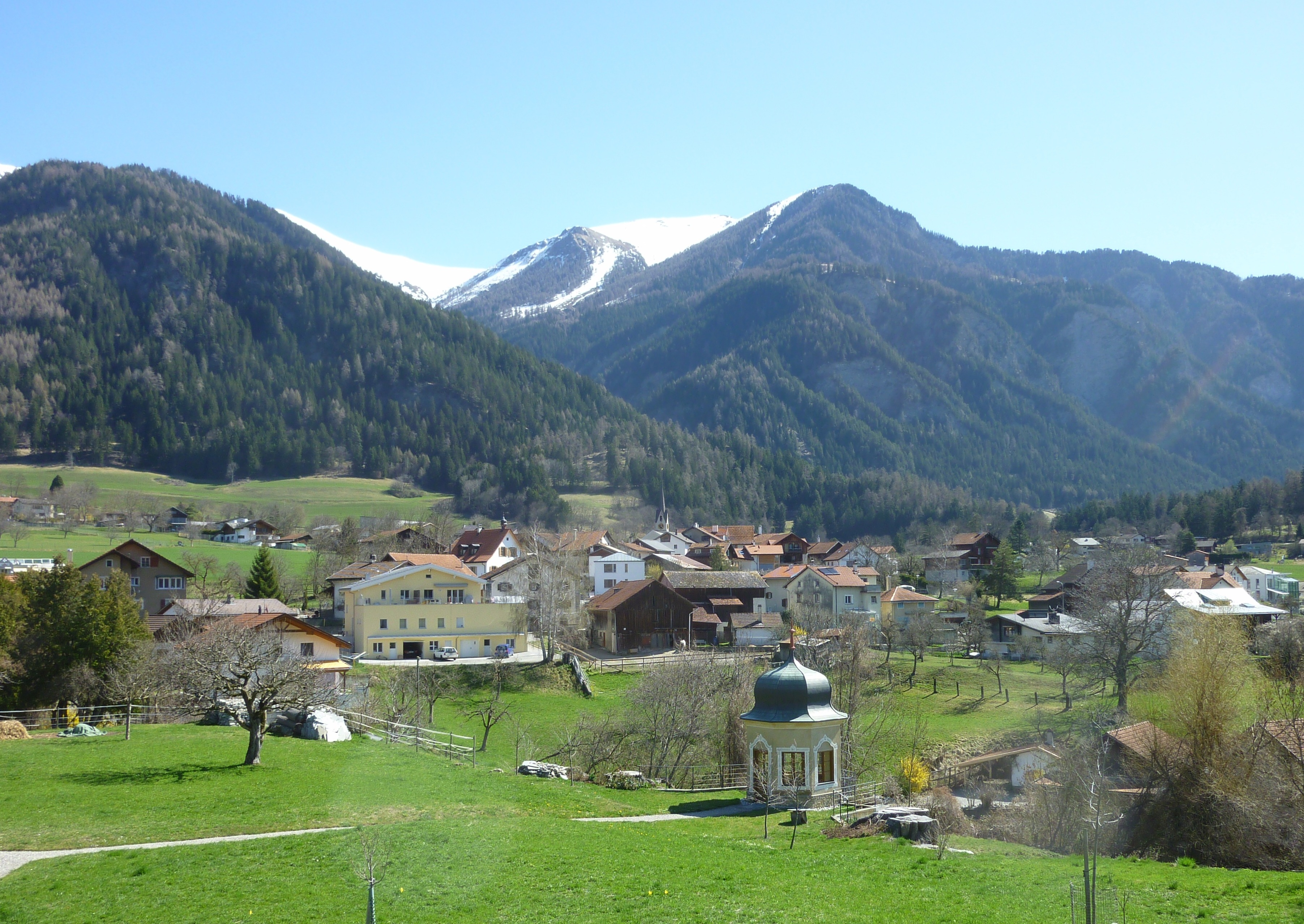 Paspels, mit Pavillon Schloss Paspels